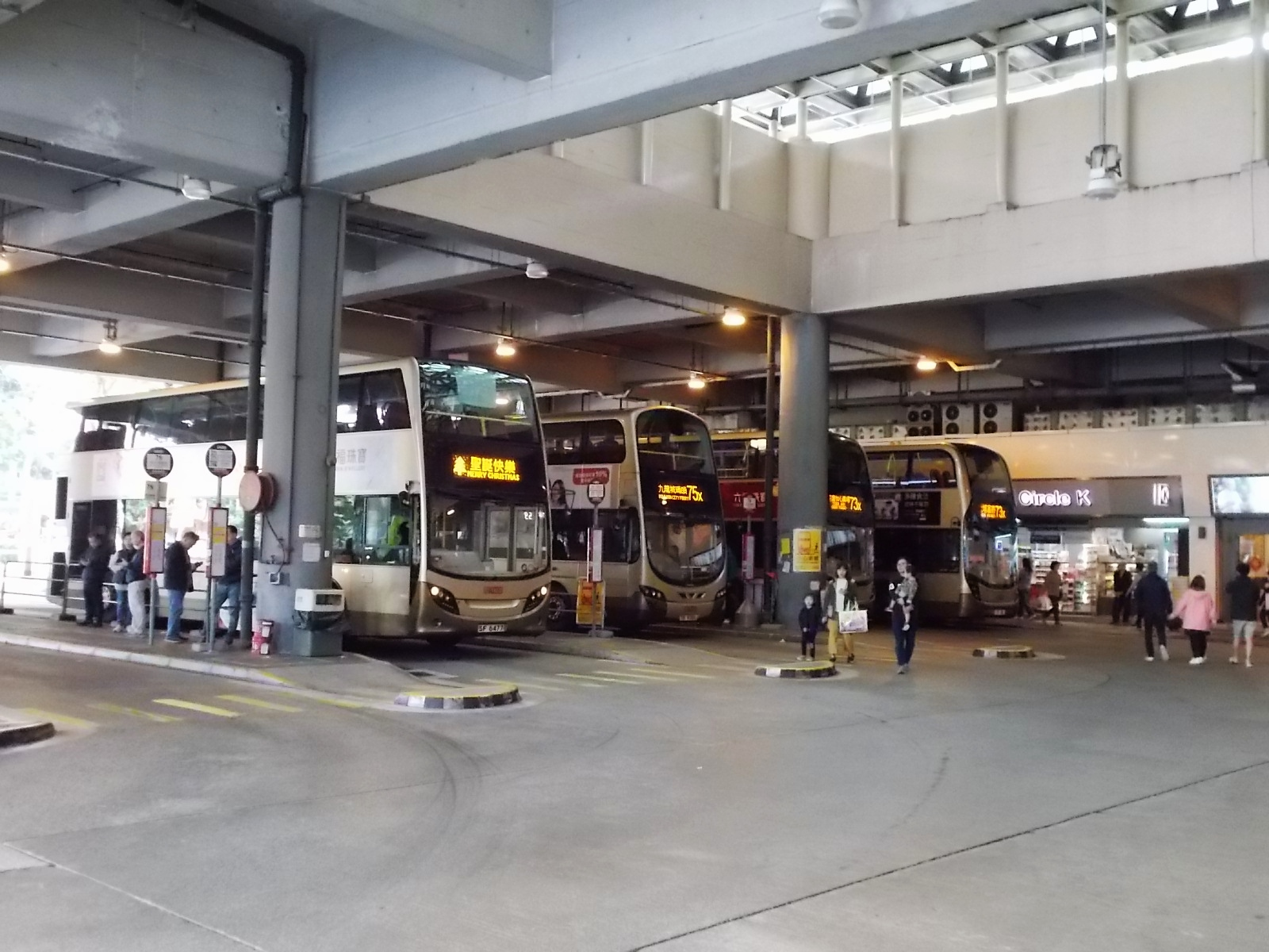 富善巴士總站(2019年)